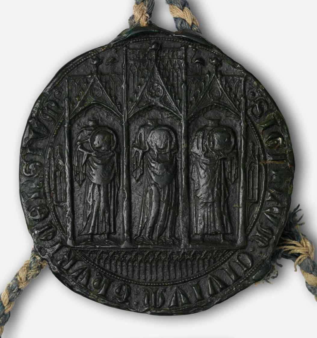 Sceau de Zurich, appendu au traité de Fribourg